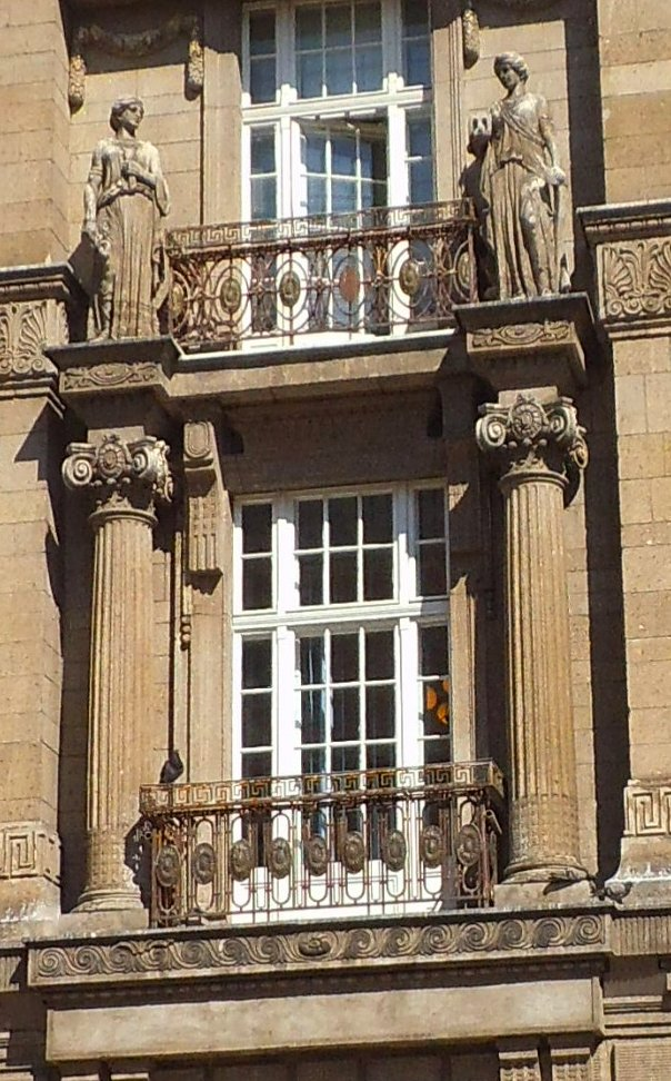 Budynek Oddziału PKO BP w Toruniu